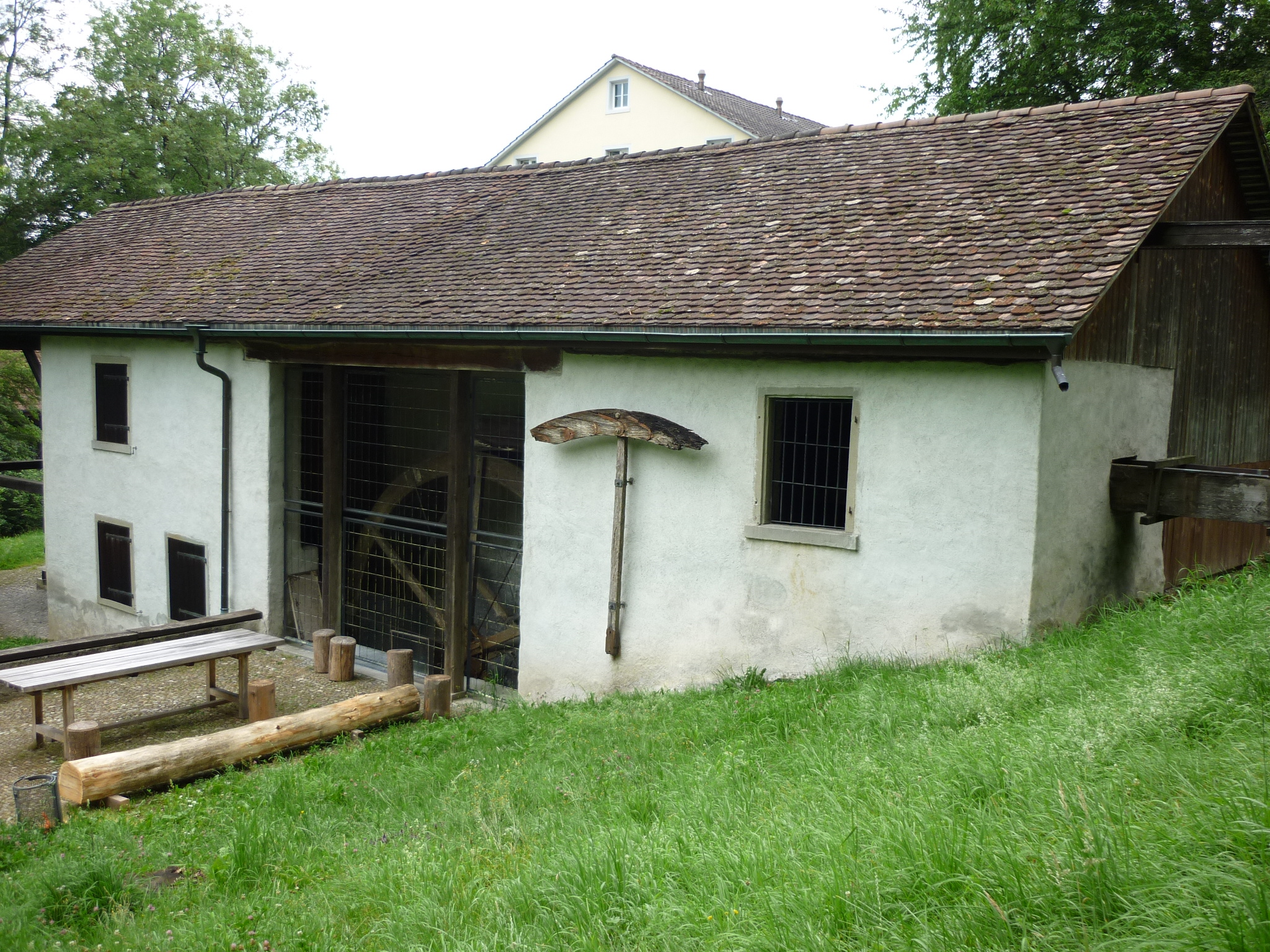 Sägerei im Wisental, Bassersdorf, Schweiz